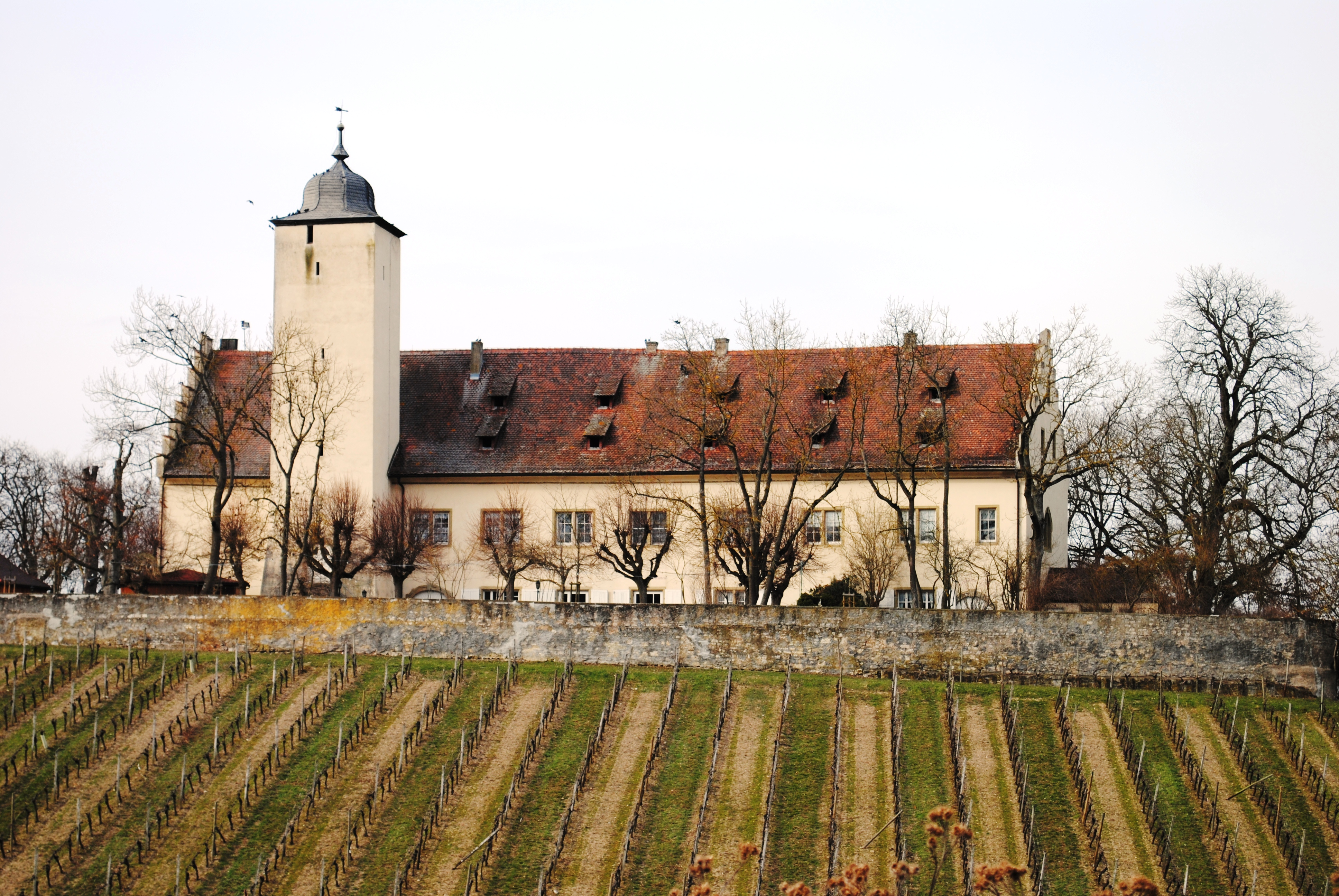 Hallburg, Gesamtanlage, Volkach, mit ovalem Bering, Bergfried 13./14. Jh., Wohntrakt zweigeschossiger Satteldachbau mit Staffelgiebel, unter Verwendung älterer Bauteile im 16. Jh. erbaut; Burgkapelle St. Pankratius, um 1400.